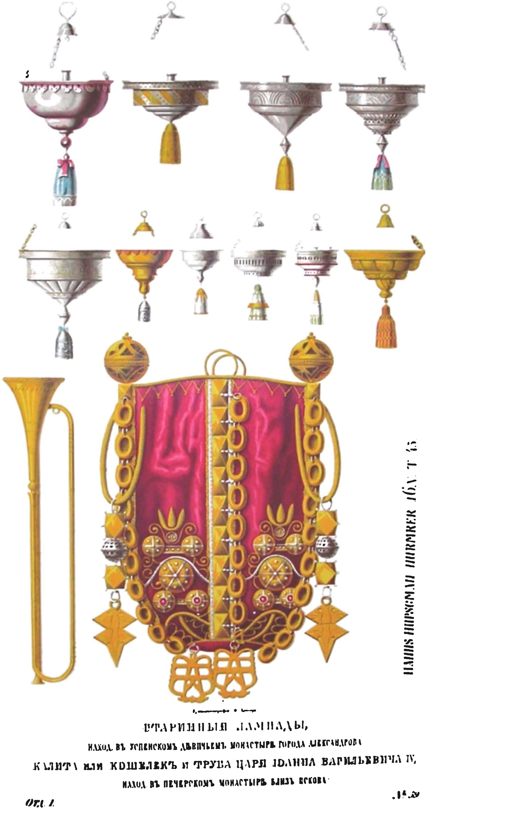 Древности Российского государства (Antiquities of Russian country), 1846—1853. Т.1. Иллюстратор — Солнцев, Фёдор Григорьевич Старинные лампады, находящиеся в Успенском девичьем монастыре города Александрова; калита, или кошелек, и труба царя Иоанна Васильевича IV, находящиеся в Печерском монастыре близ Пскова Первые хранятся в Успенском девичьем монастыре уездного города Александрова, а остальные в Печерском монастыре близ Пскова. Лампады сии из меди и серебра разной формы, как значится на рисунке; кроме стиля и предания, ничто не определяет их древности. Калита, давшая прозвание великому князю Московскому, Иоанну I, есть слово татарское, значащее «сума», «кошелек на поясе»; оно встречается в духовных грамотах великих князей. Калита Иоанна IV устроена из красной камки с серебряными вызолоченными бляшками. Сходный с ней кошелек находится в собрании древностей у П.Ф. Карабанова. По-видимому, набожный царь оставил эту калиту на память в любимой им Псково-Печерской обители, которой не мог взять Стефан Баторий и которая многократно и доблестно выдерживала сильные нападения и осады лифляндских рыцарей. Медная вызолоченная труба, без сомнения, есть один из трофеев войны русских с лифляндцами и поляками. На краях ее вырезана следующая надпись: HANNS HUPSCMAN NURMKEK 16. V. T. 45